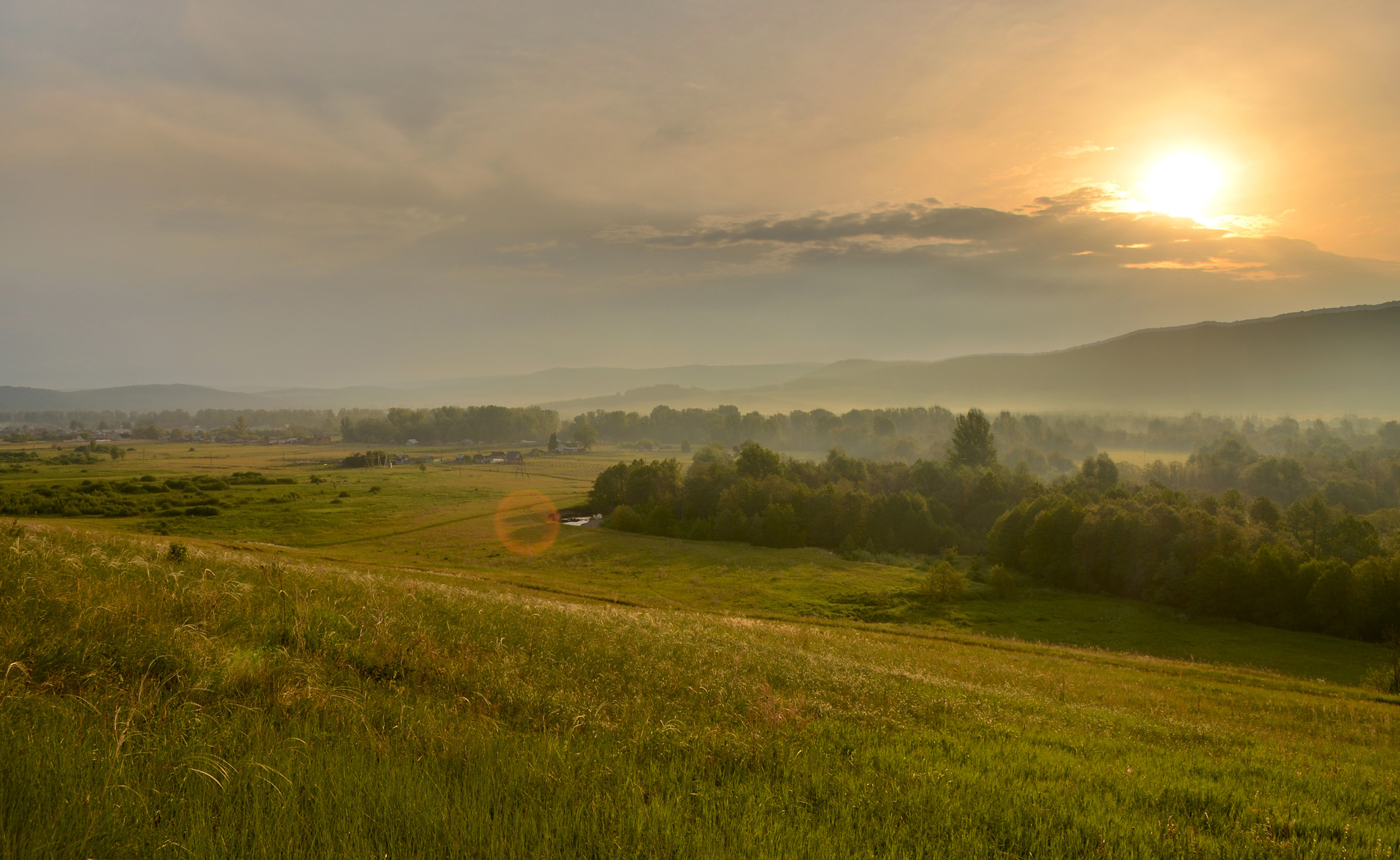 dawn over the river Zigan, (Зигановка (Ишимбайский район))